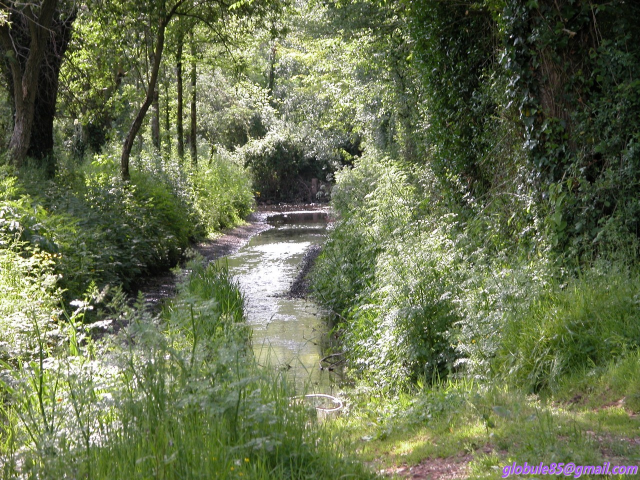 image de la campagne givraise (200 mètres de la mairie) prise par mes soins. Pannetier Régis (moi-même)